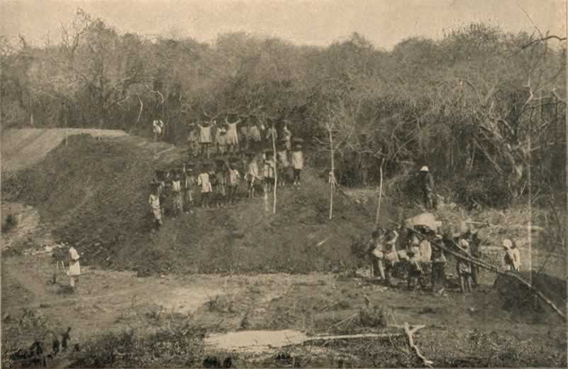 Ugandabahn: Bahnbau in Railhead